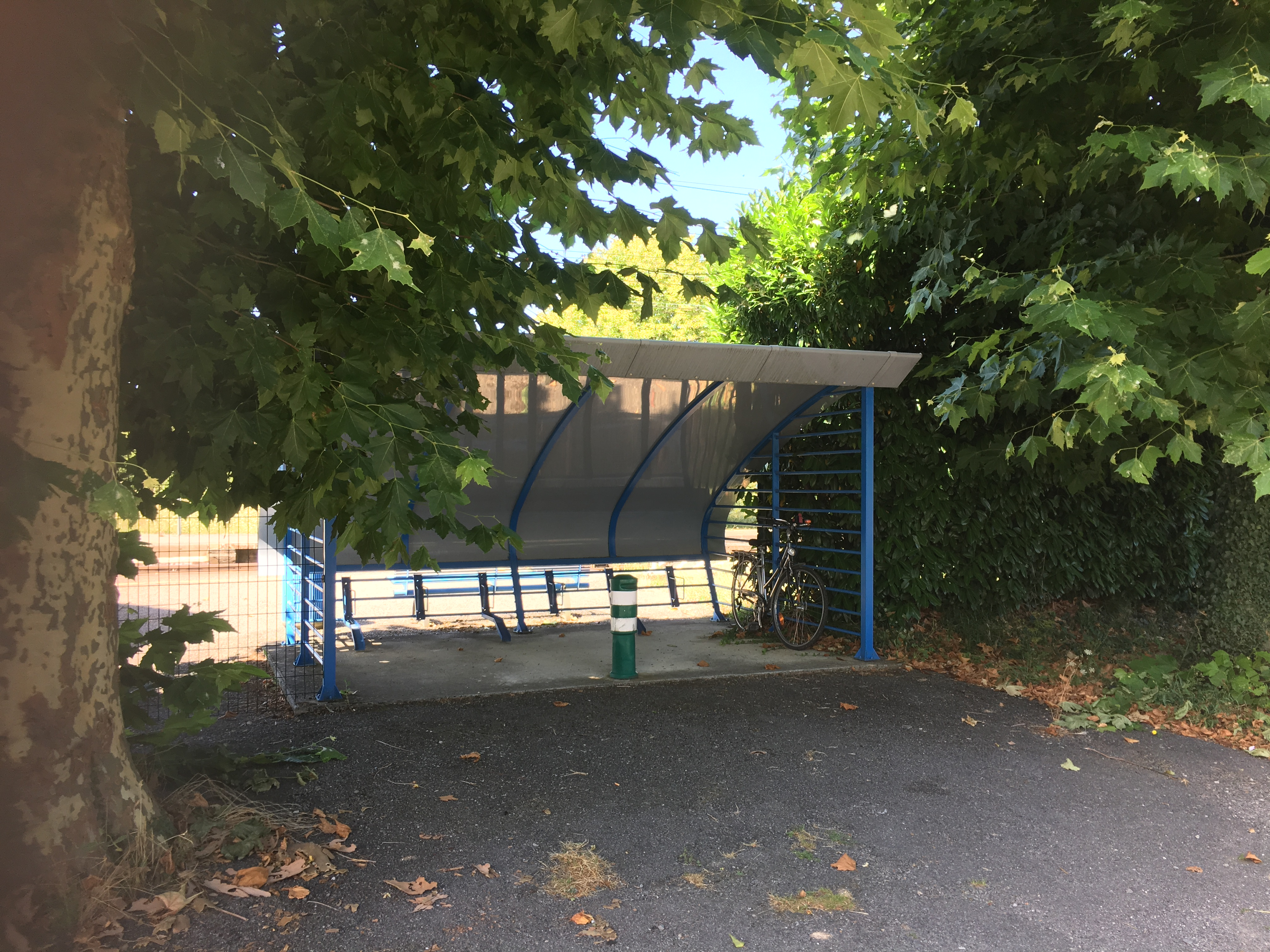 Gare d'Éguzon (36) : Le garage à vélos.